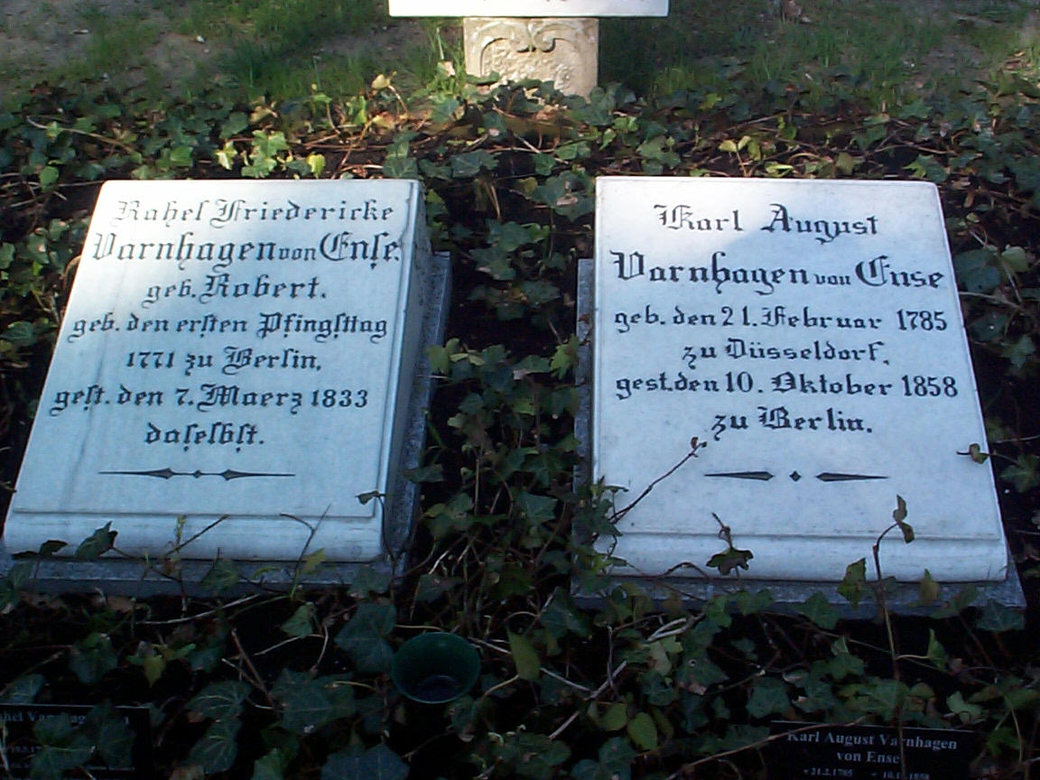 La tombe de Rahel Varnhagen von Ense et son mari Karl August Varnhagen von Ense au cimetière "Dreifaltigkeitsfriedhof" à Berlin Photo faite par moi-même le 26 mai 2006 Auteur: Karin Laakes